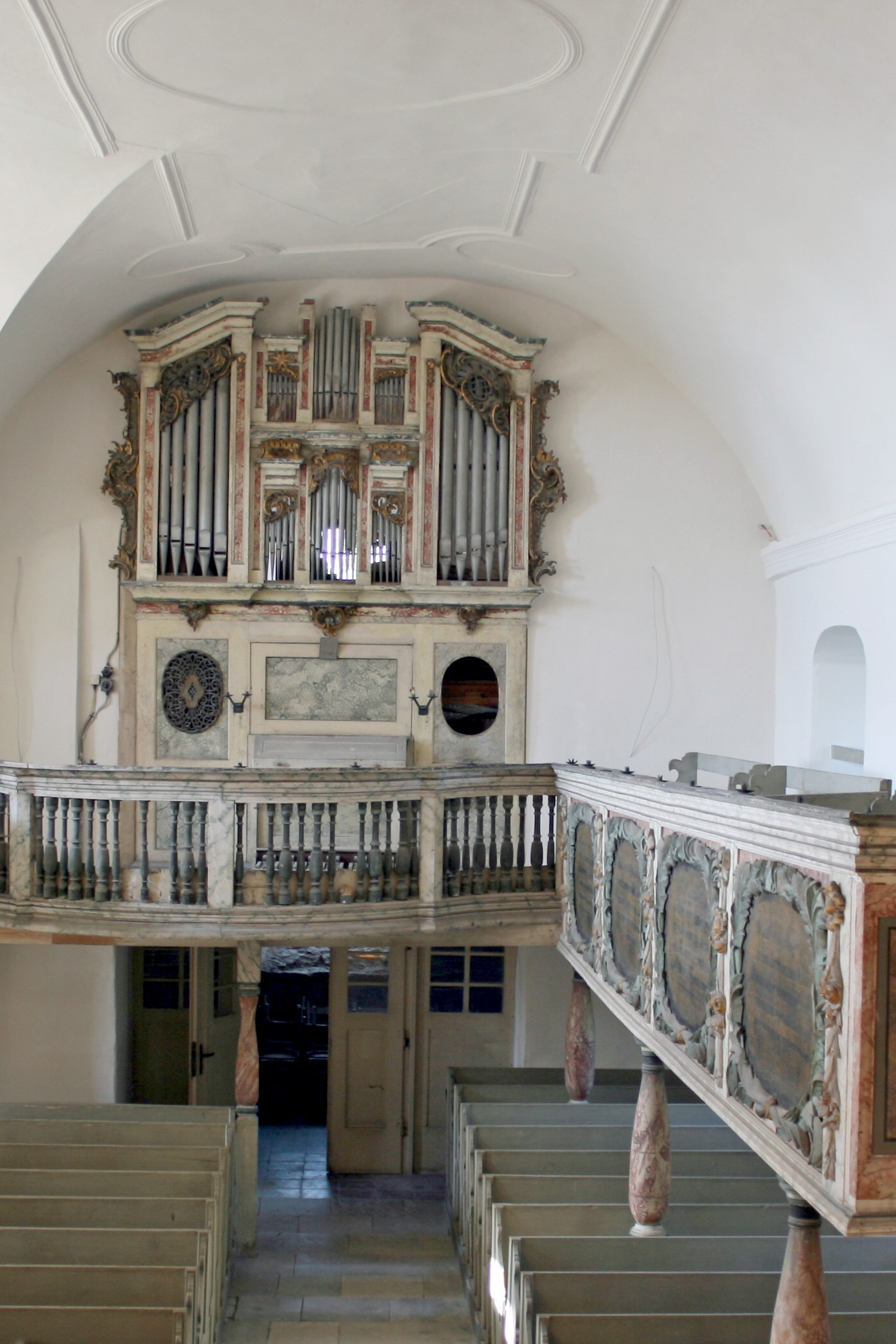 Sankt-Michaelis-Kirche Raßnitz Ortsteil Weßmar, Blick auf die Orgelempore (Prospekt 1754, Orgel Wilhelm Rühlmann 1920er)